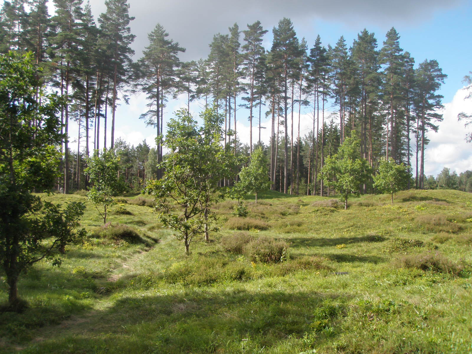 Stenehed är ett område med fornminnen i Hällevadsholm, Munkedals kommun. Förutom ett gravfält och en skeppssättning finns det här nio bautastenar resta på en lång rad. Ursprungligen var det elva eller tolv stenar. Stenehed har även använts under historisk tid, då som övnings- och mötesplats för Bohusläns regemente mellan åren 1692 till 1770.